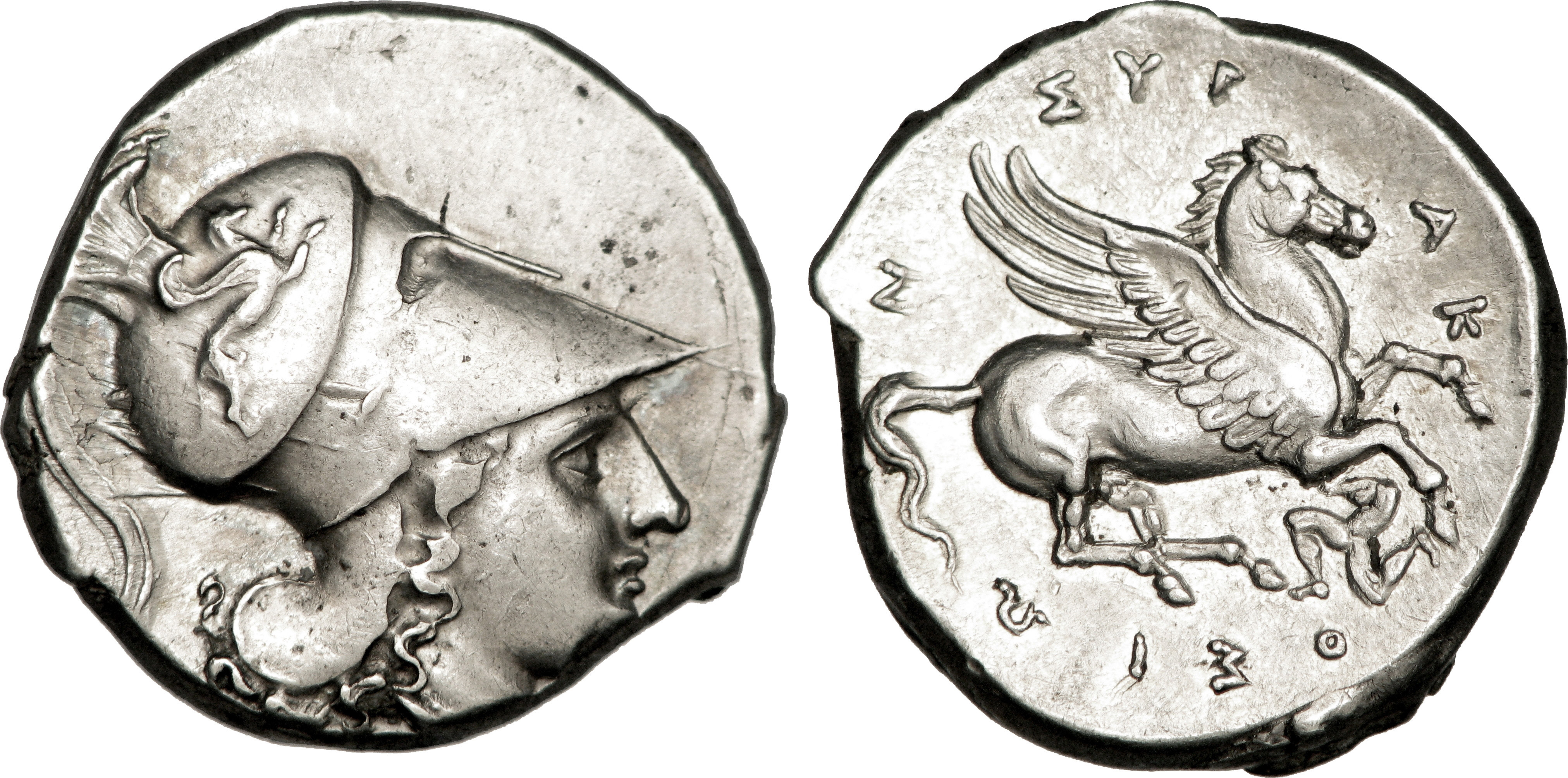 Nom de l'atelier : Sicile, Syracuse Métal : argent Diamètre : 20mm Axe des coins : 6h. Poids : 8,55g. Titulature avers : Anépigraphe. Description avers : Tête d'Athéna à droite, coiffée du casque corinthien orné d’un griffon. Description revers : Pégase volant à droite ; au-dessous entre les jambes, un triskèle. Légende revers : SUR-AK-OSIWN. Traduction revers : (de Syracuse).